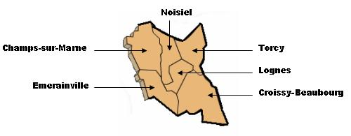 Les communes de la Communauté d'agglomération (ex SAN) du Val Maubuée à Torcy. (département de Seine-et-Marne, région Île-de-France).